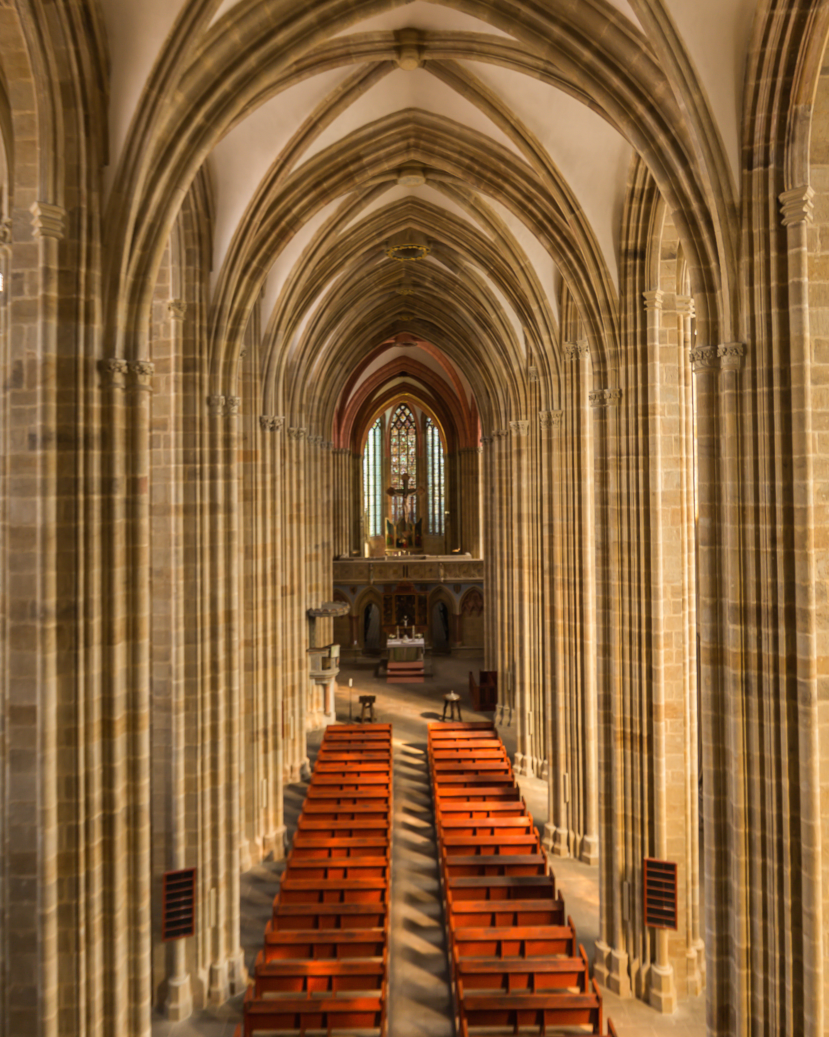 Meißen Domplatz 2 Meißner Dom dreischiffige gotische Hallenkirche , Blick von der Orgelempore ins Mittelschiff